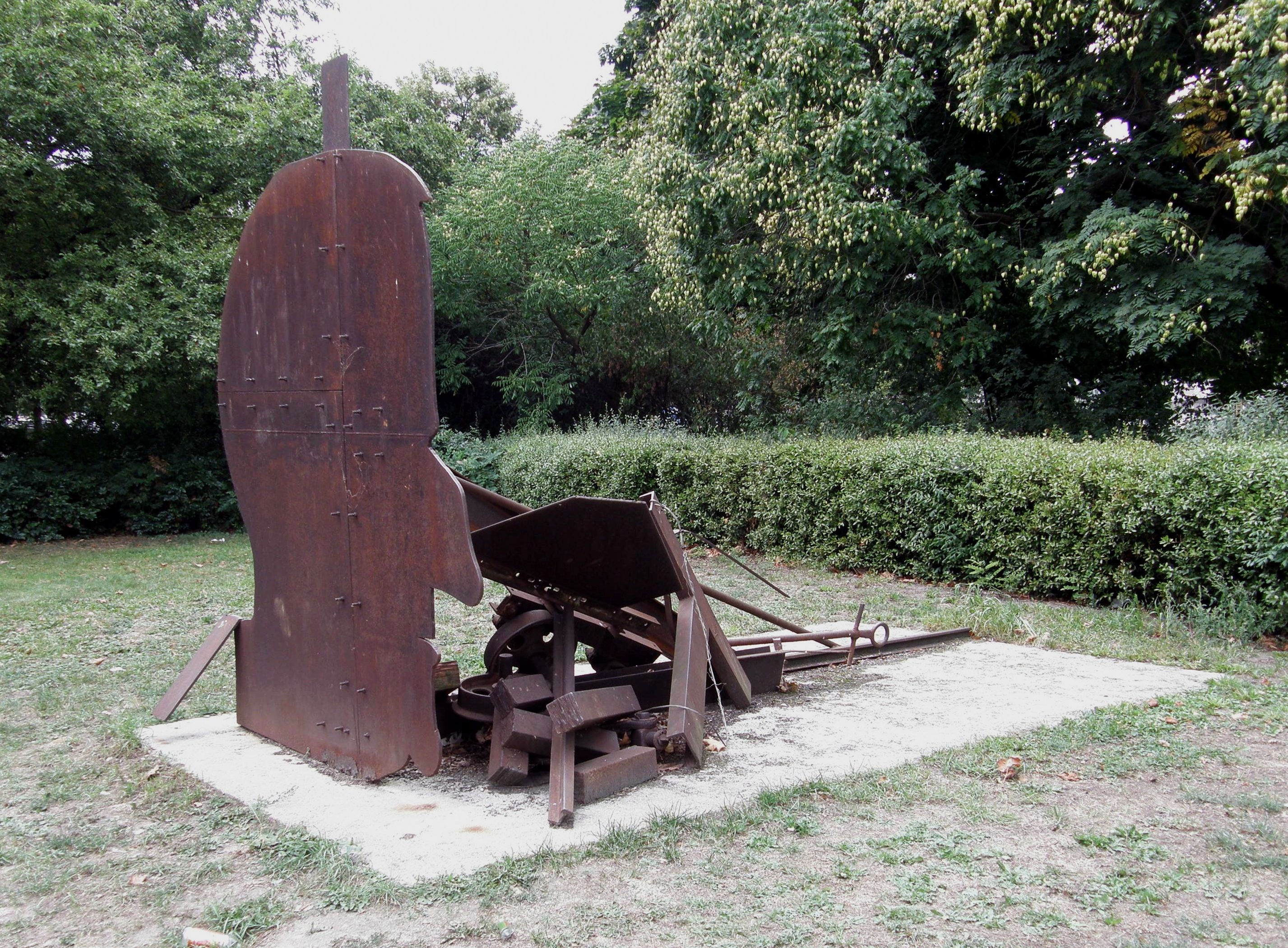 Igael Tumarkin: Bertolt Brecht. 1991, Eisen. Wallstraße gegenüber Märkischen Museum.